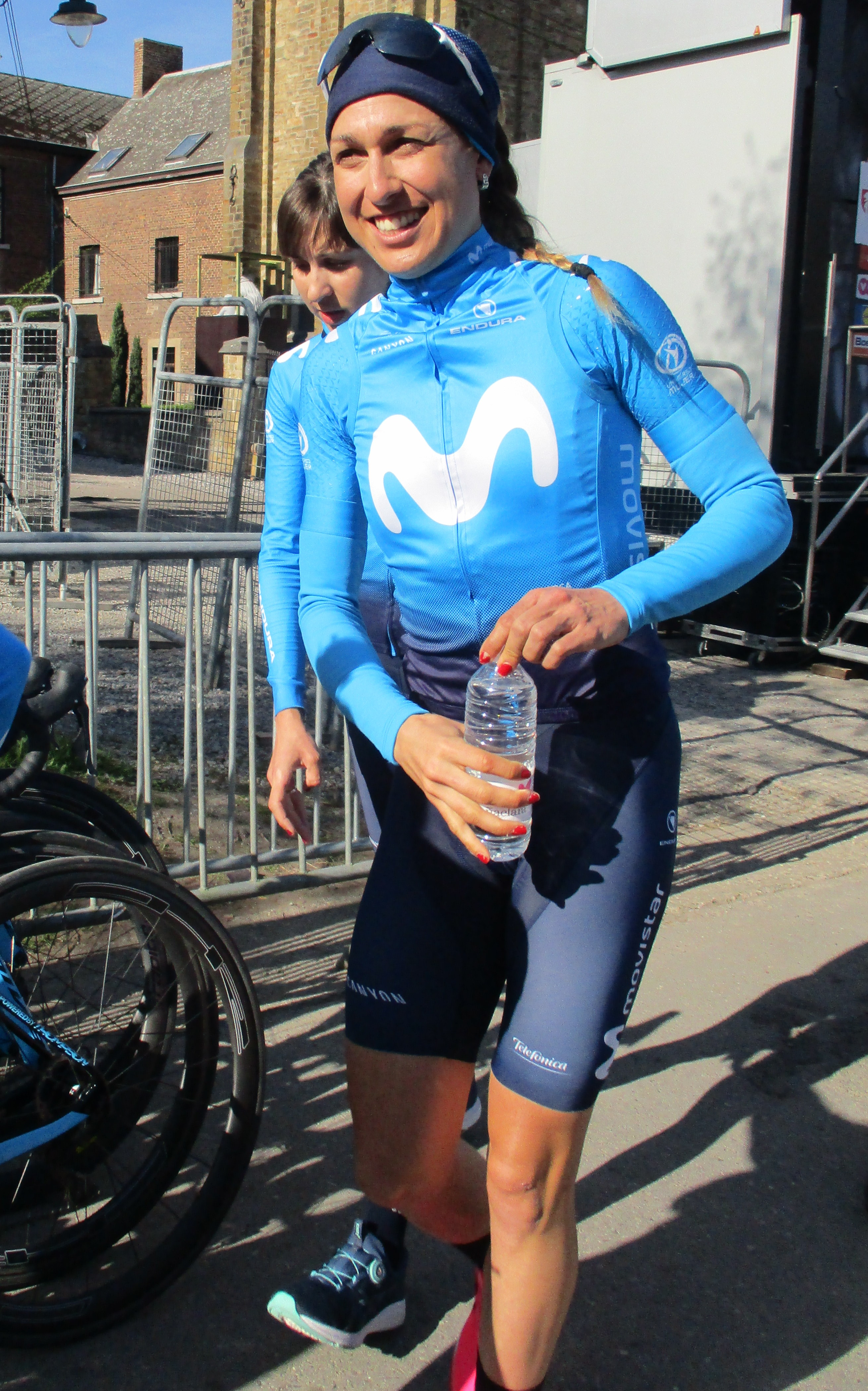 Start van de Waalse Pijl 2018 op de Mur van Huy.